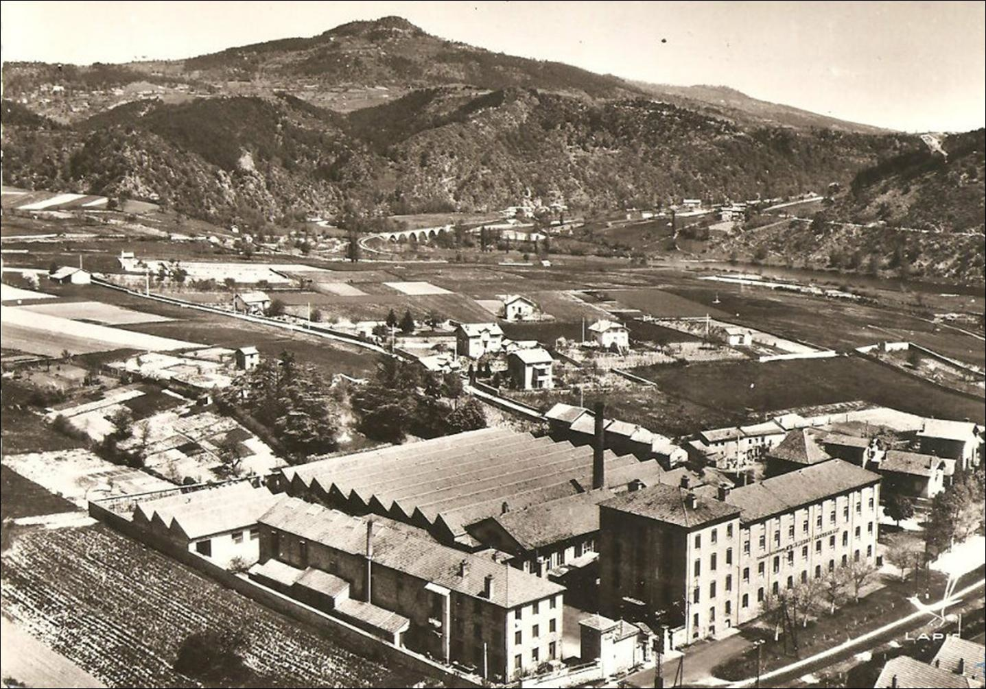 Retournac (Haute-Loire, France). Usine de tissage et moulinage Descours.